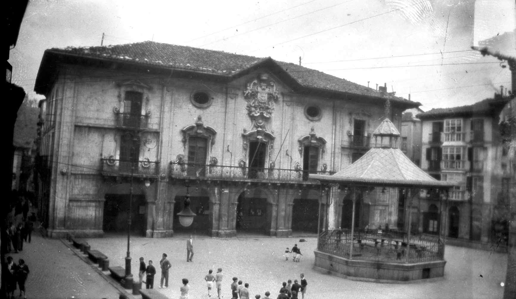 Arrasateko herriko plaza eta udaletxearen eraikina XX. mende hasieran. Argazkia Gipuzkoako Foru Aldundiko Kultura eta Euskara Departamentuaren atarian eskuratu daiteke